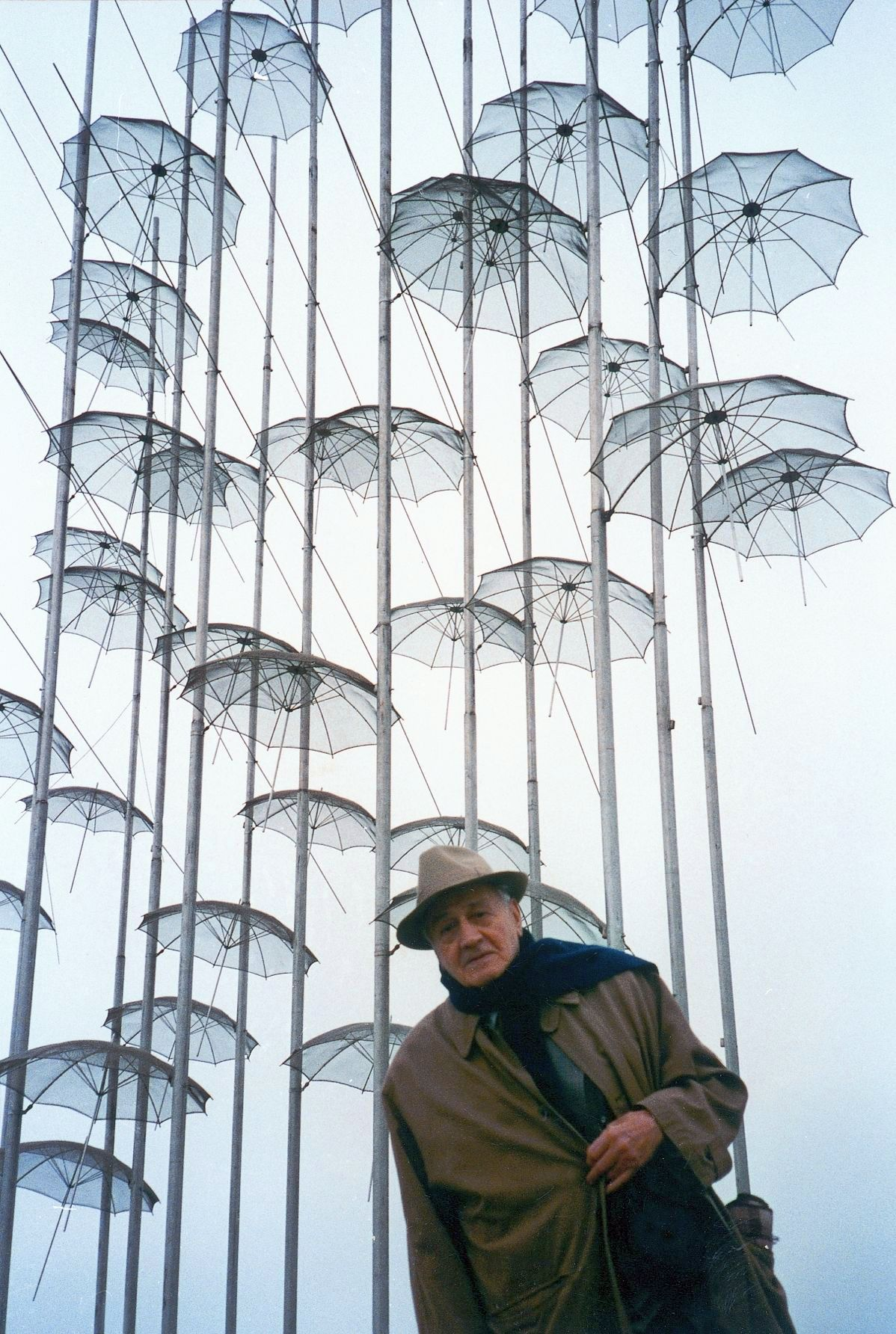 Ο Γιώργος Ζογγολόπουλος μπροστά από το γλυπτό του "Ομπρέλες", Θεσσαλονίκη 1997